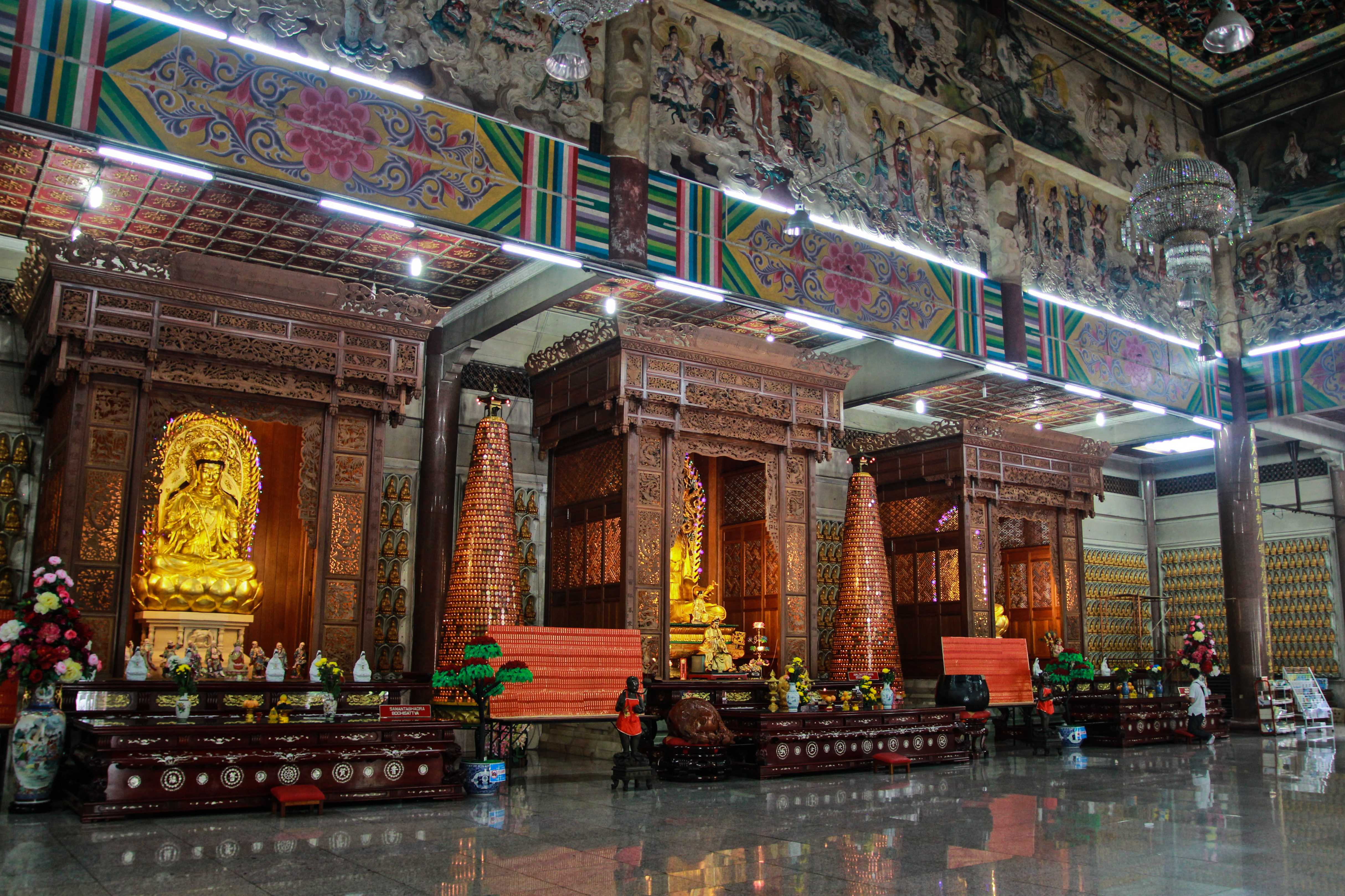 Kek Lok Si Tempel, Georgetown, Penang